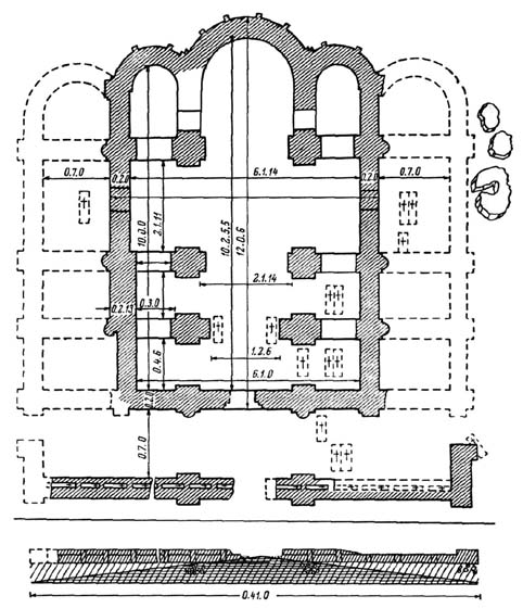 Борисоглебский собор на Смядыни. План. Размеры указаны в "саженях.аршинах.вершках".